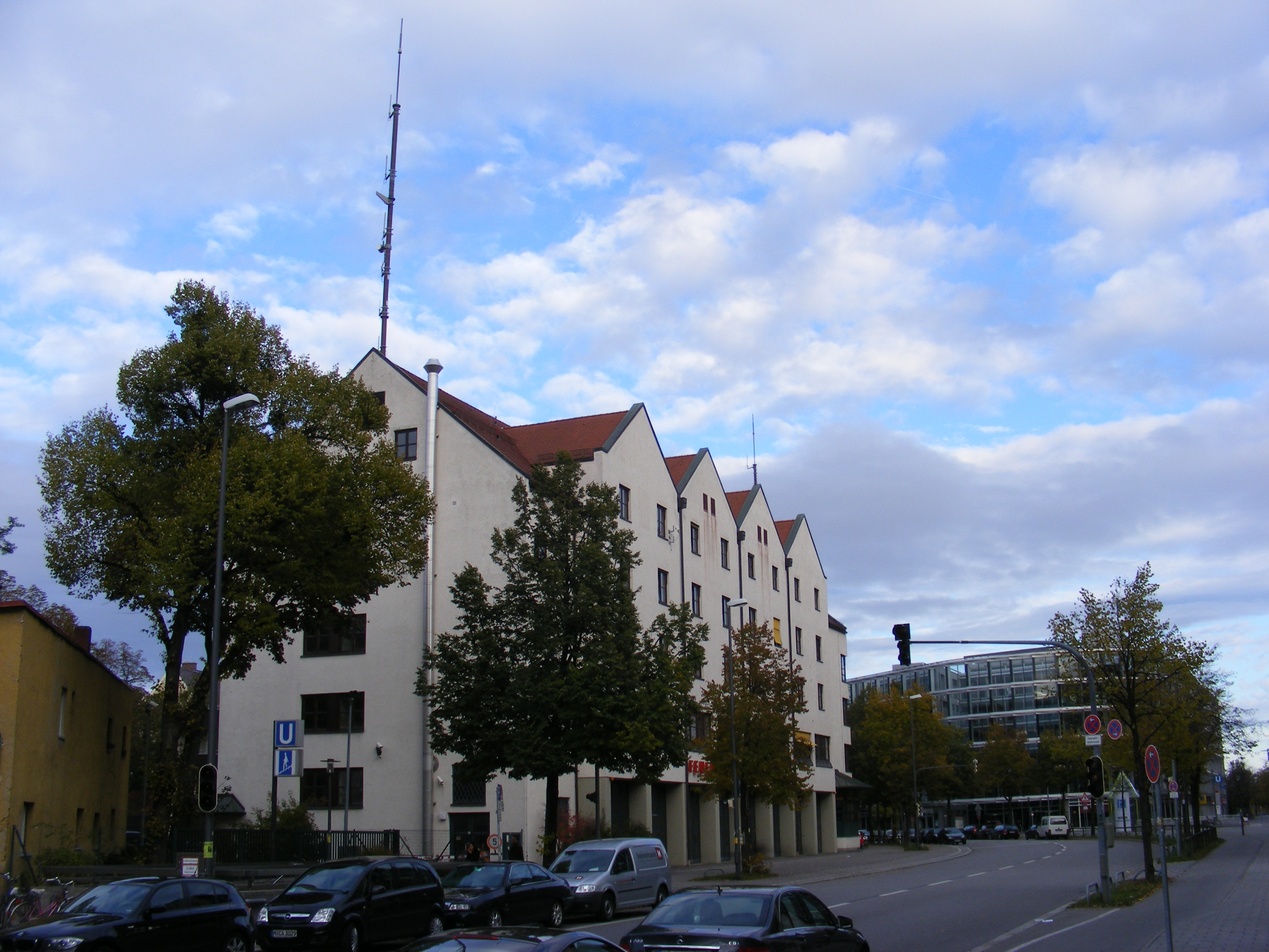 München, Heimeranstr. 10 — Feuerwache 3, Außenansicht